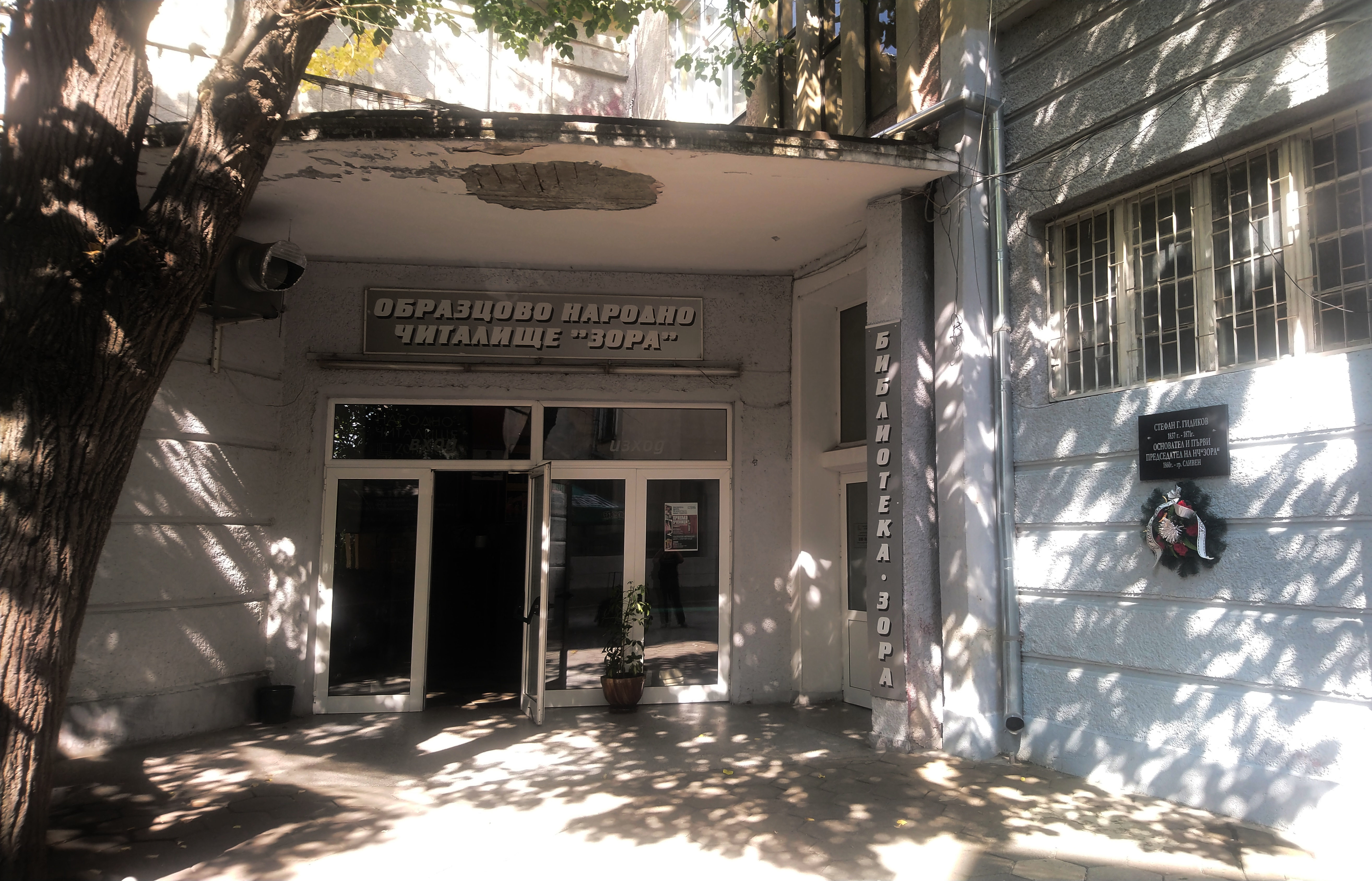 Входът на читалище „Зора“, Сливен